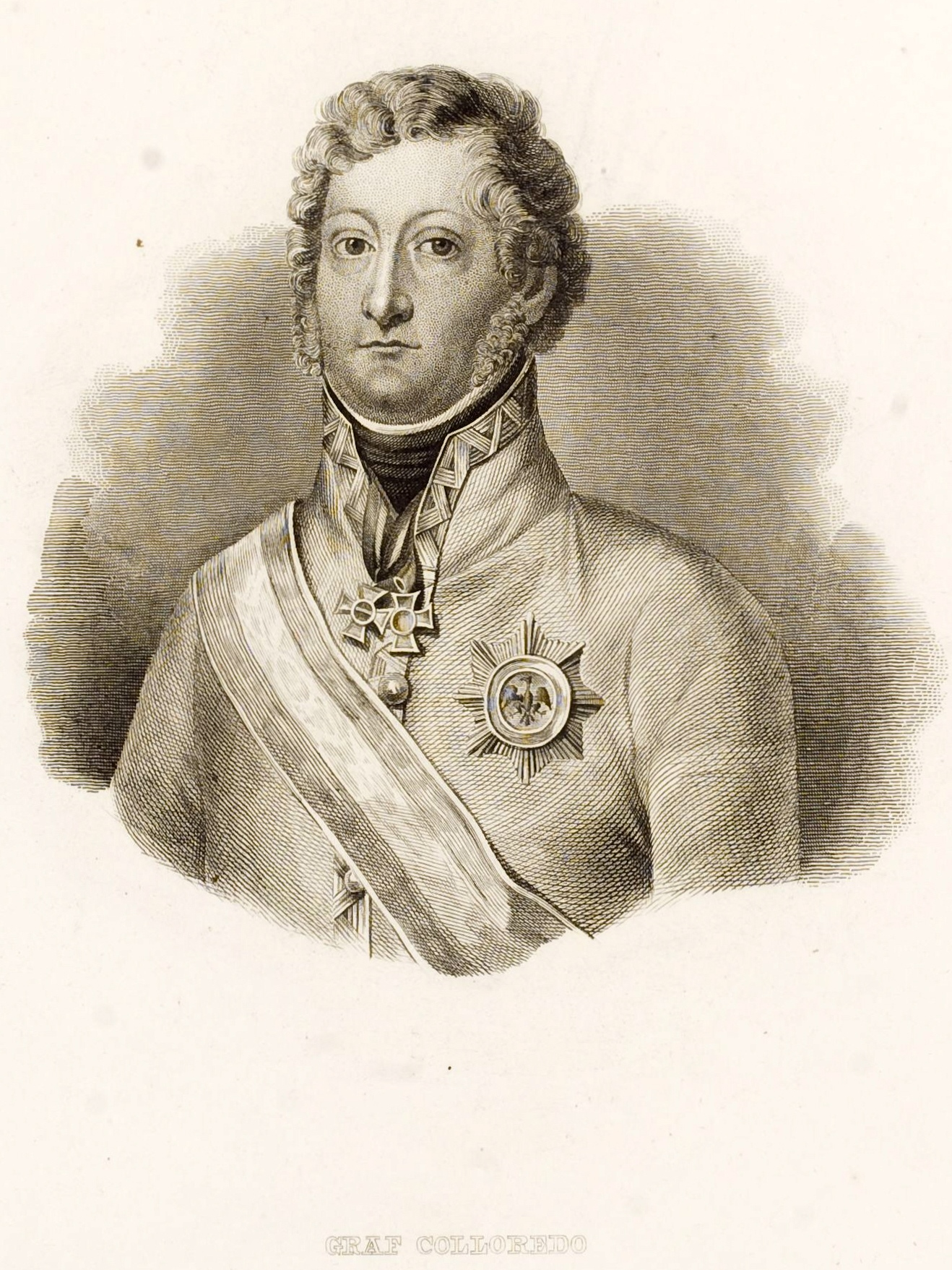 Bildnis Franz de Paula Graf von Colloredo (1799-1859), Verlag George Westermann, Braunschweig, 1841; Stahlstich, 246 x 158 mm (Blatt)